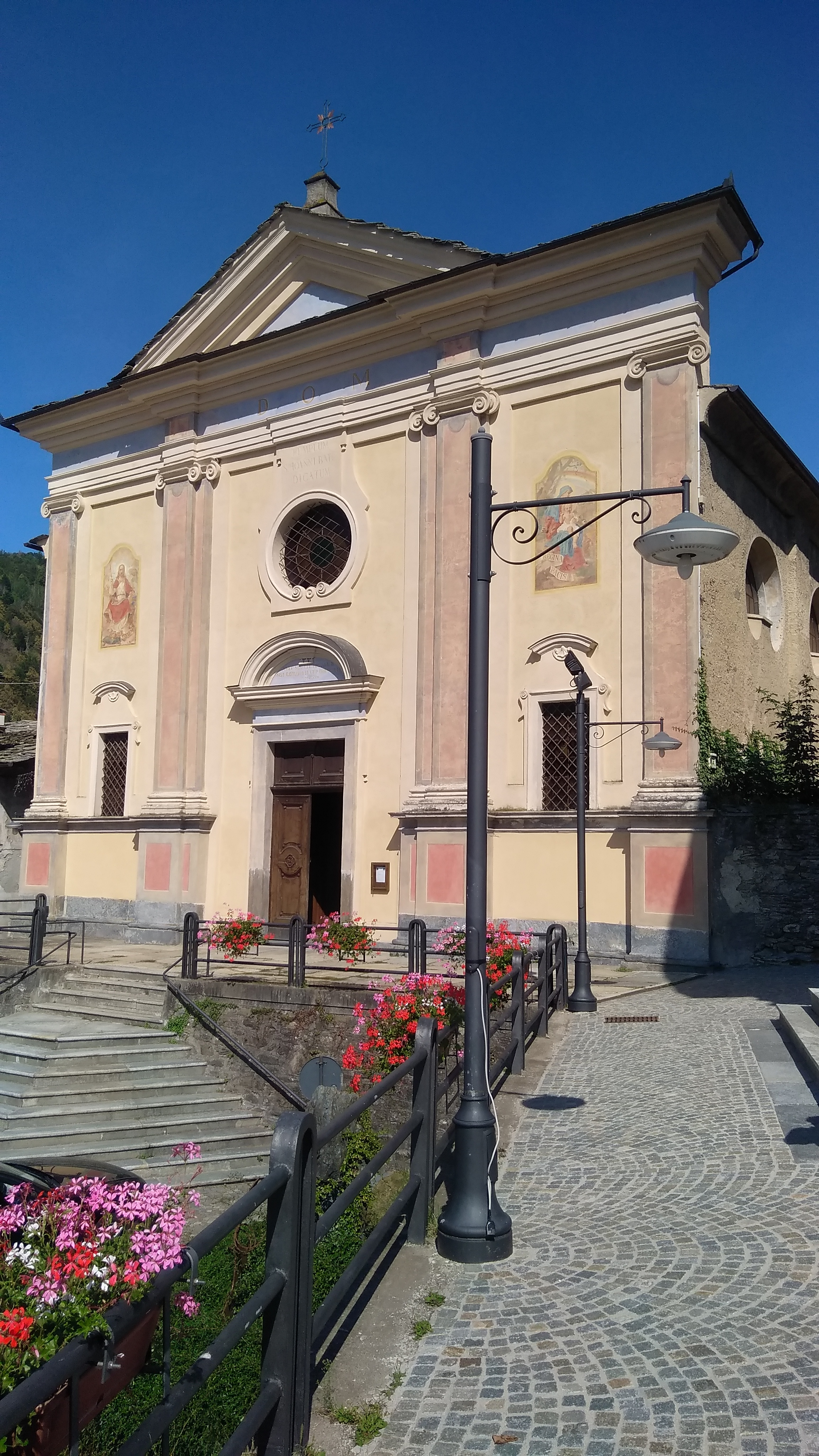 Melle (provincia di Cuneo): la parrocchiale intitolata a San Giovanni Battista